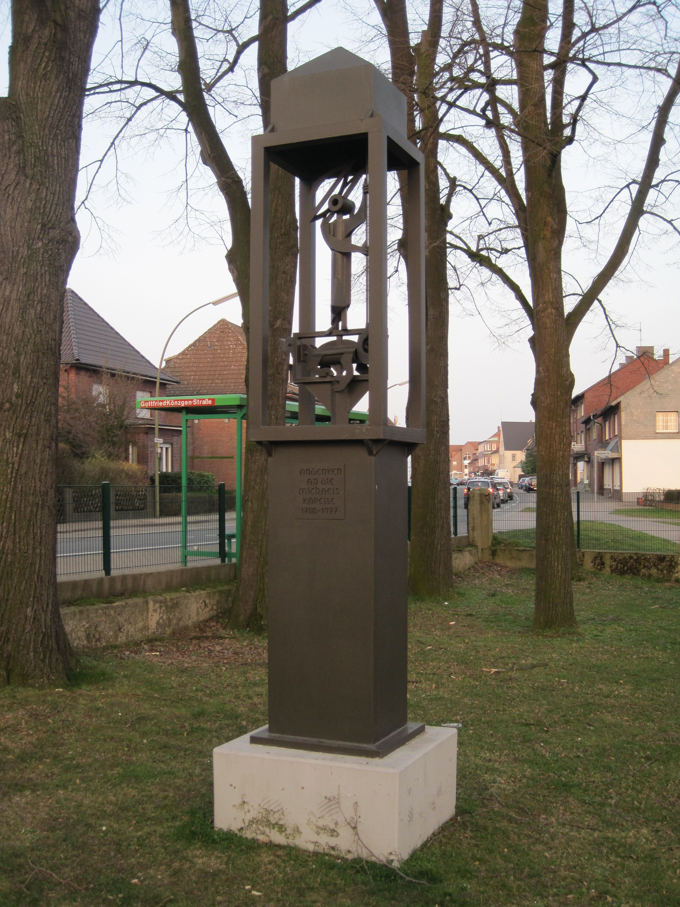 Das Foto zeigt die Michaelskulptur in Hamm-Bockum-Hövel, Ecke Stockumer Straße/Hammer Straße, die an die einst dort befindliche Michaelkapelle erinnern soll.